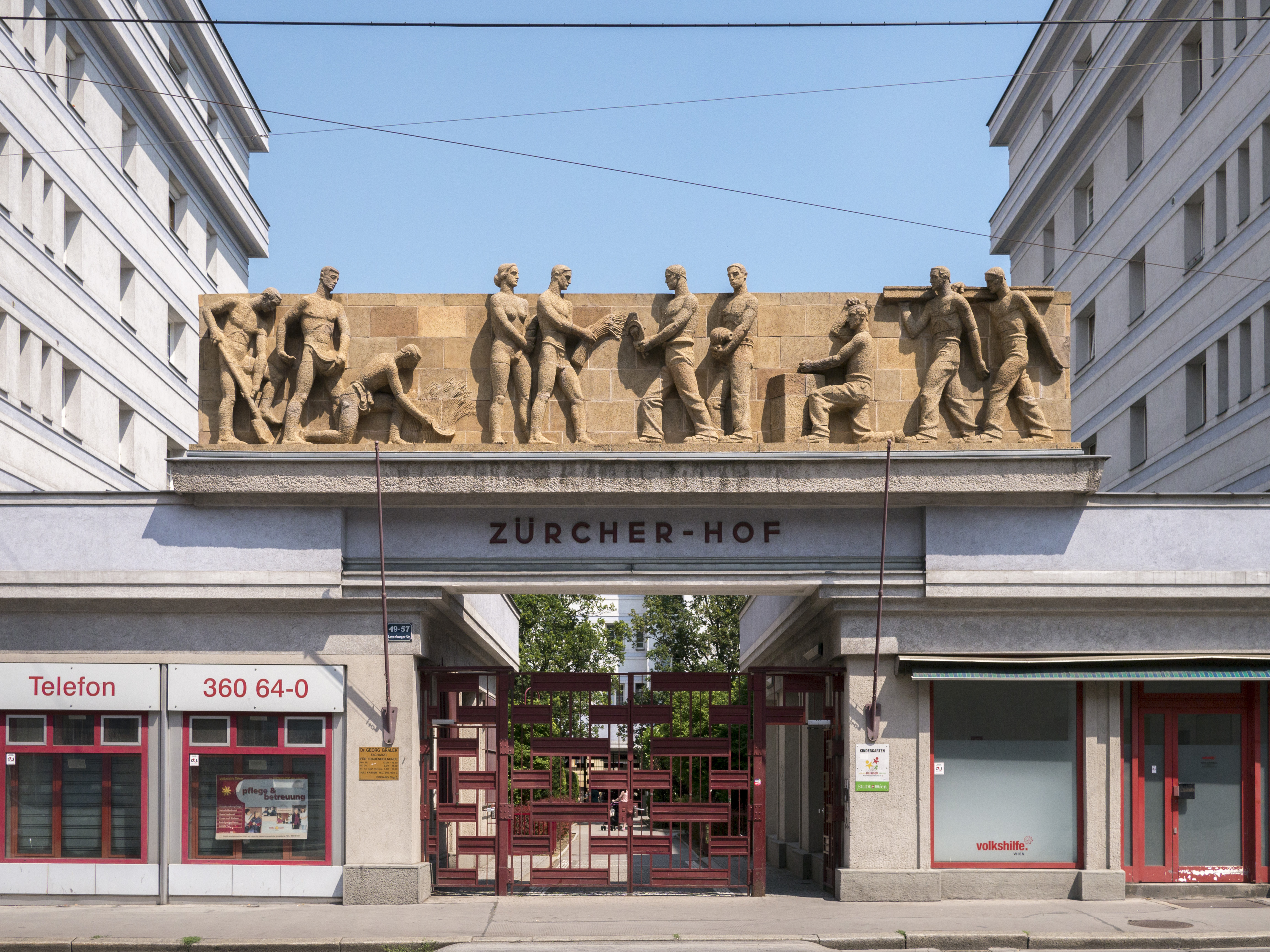 Zürcher Hof